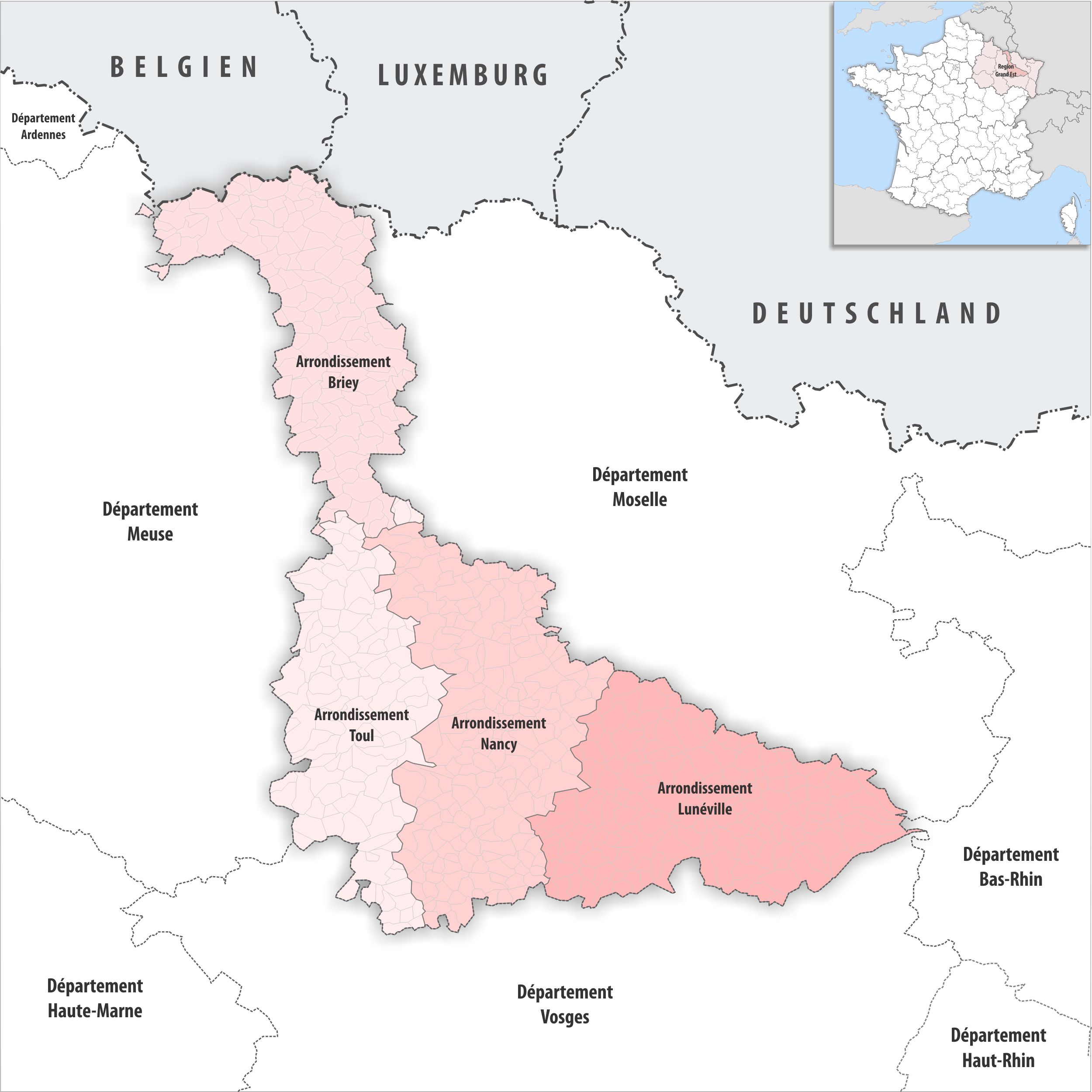 Gemeinden und Arrondissemente im Departement Meurthe-et-Moselle